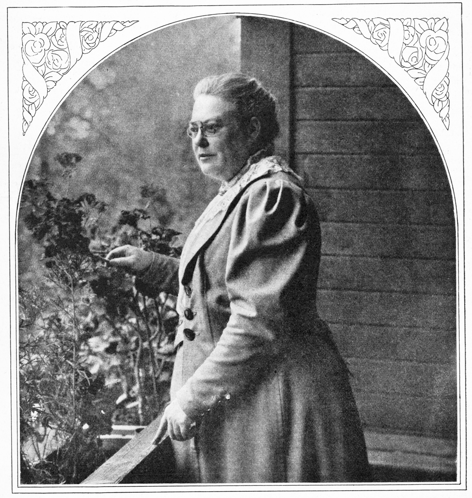 Anna Whitlock (1852-1930) på omslaget till Hvar 8 Dag 1912.